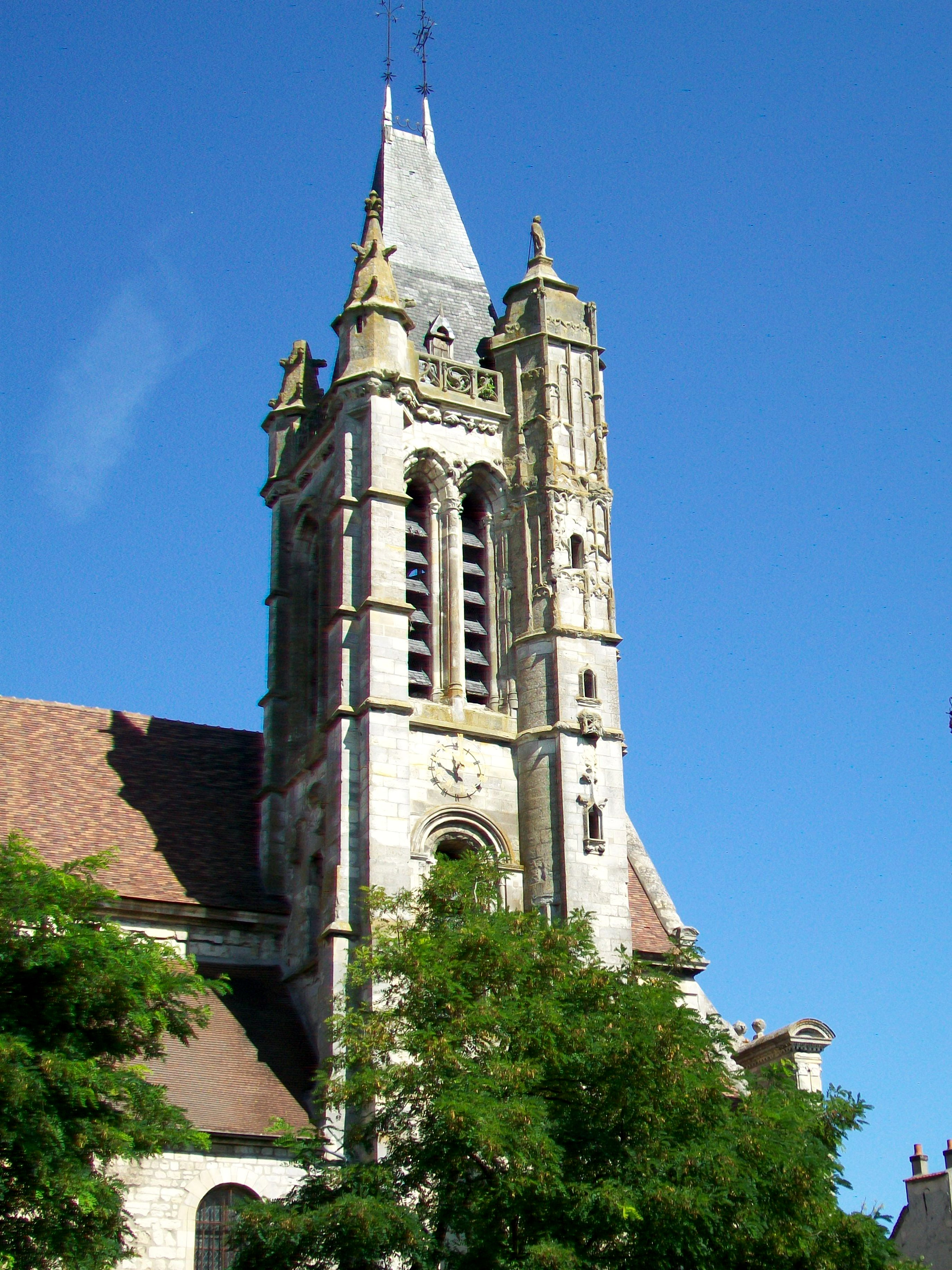 La façade sud du clocher.